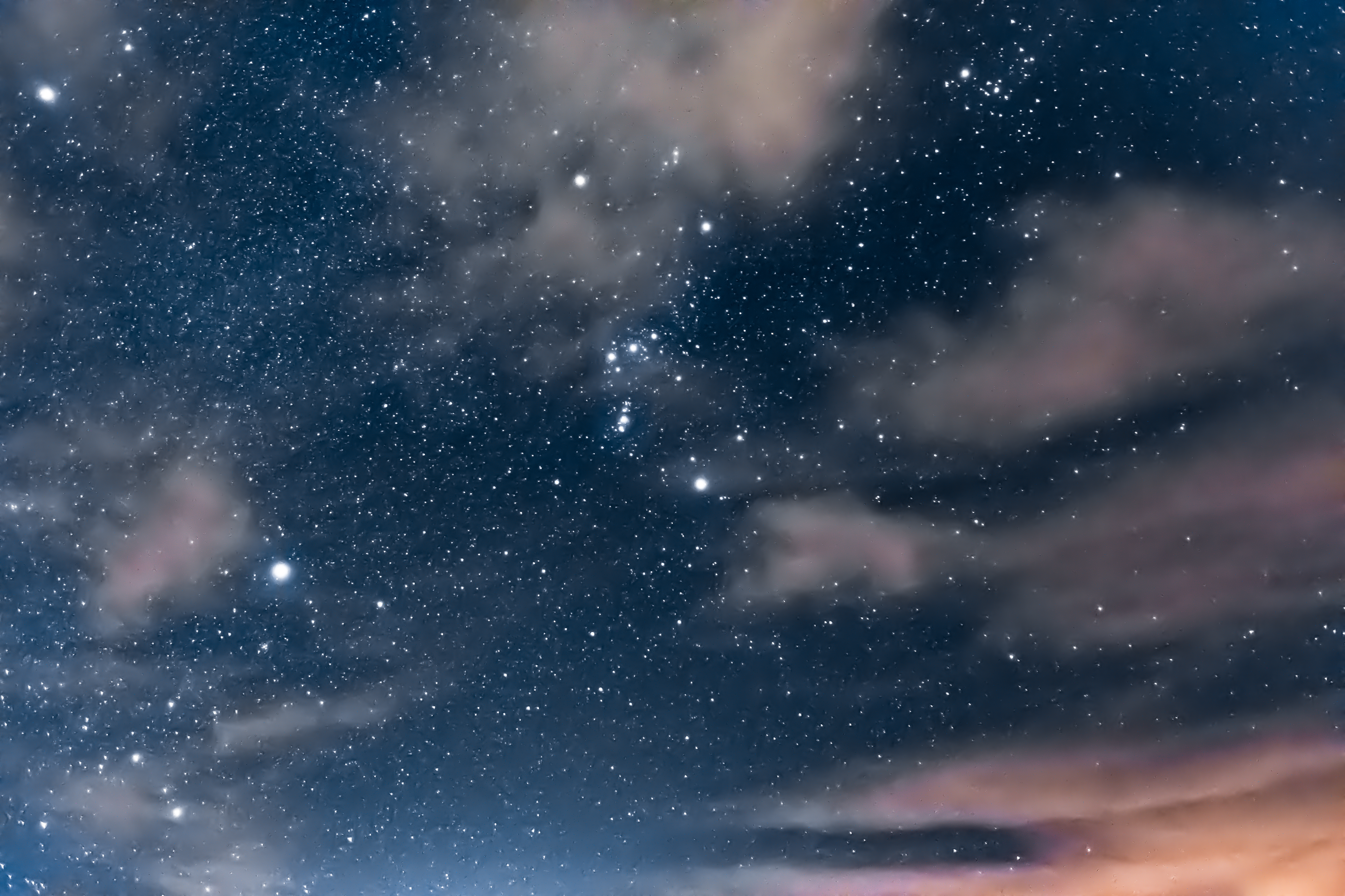 Orion in Winter